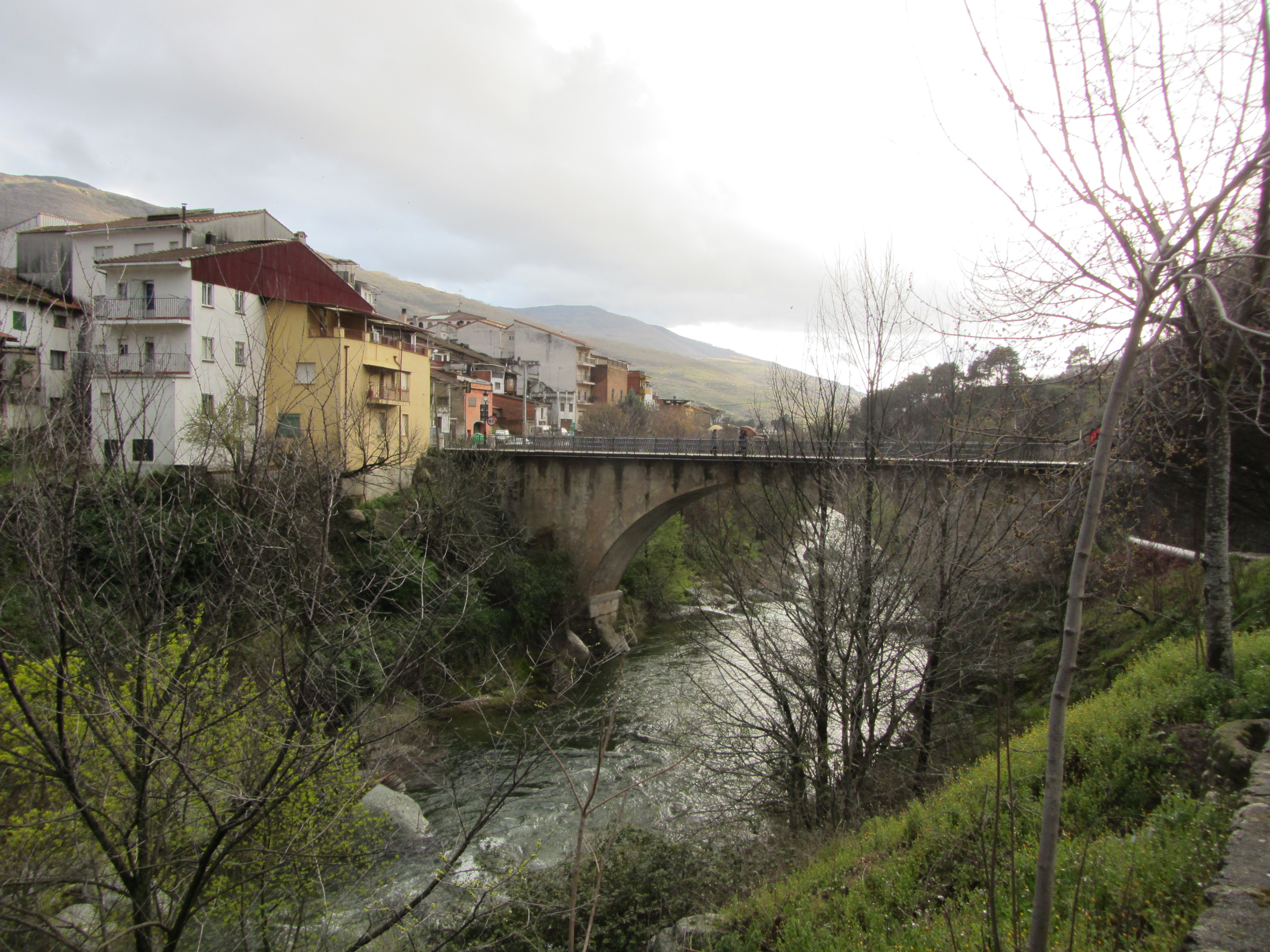 Zubi erromatarra.